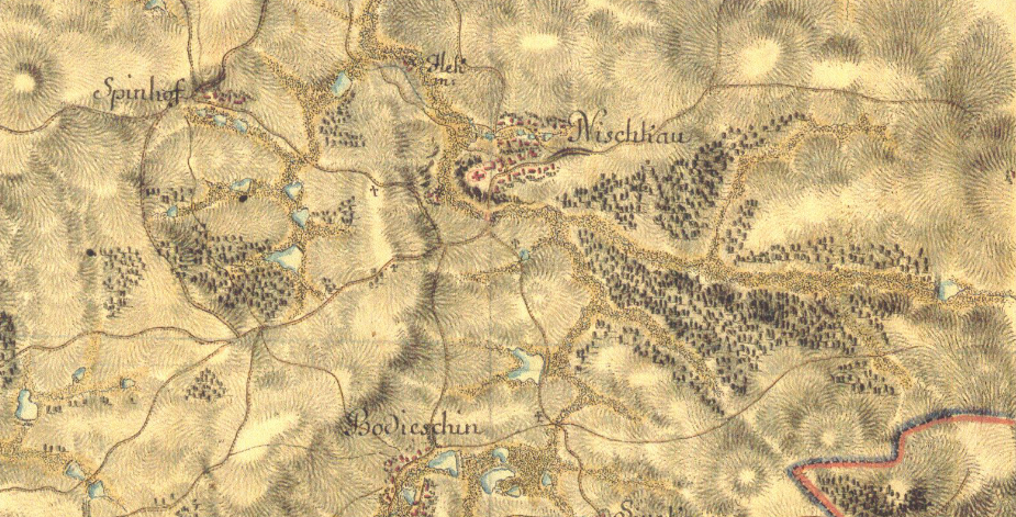 Nížkov a jeho okolí - I. vojenské mapování – josefské (1764–1768, 1780–1783).